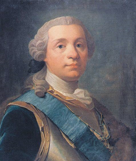 detail